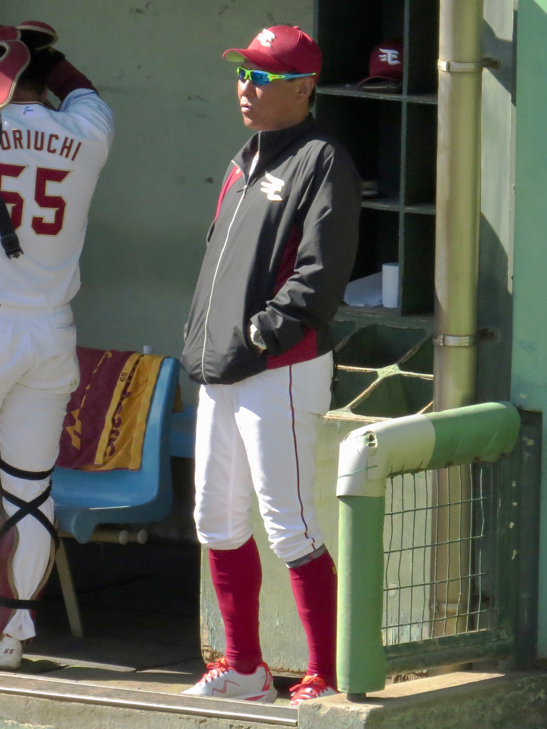 さいたま市営浦和球場にて